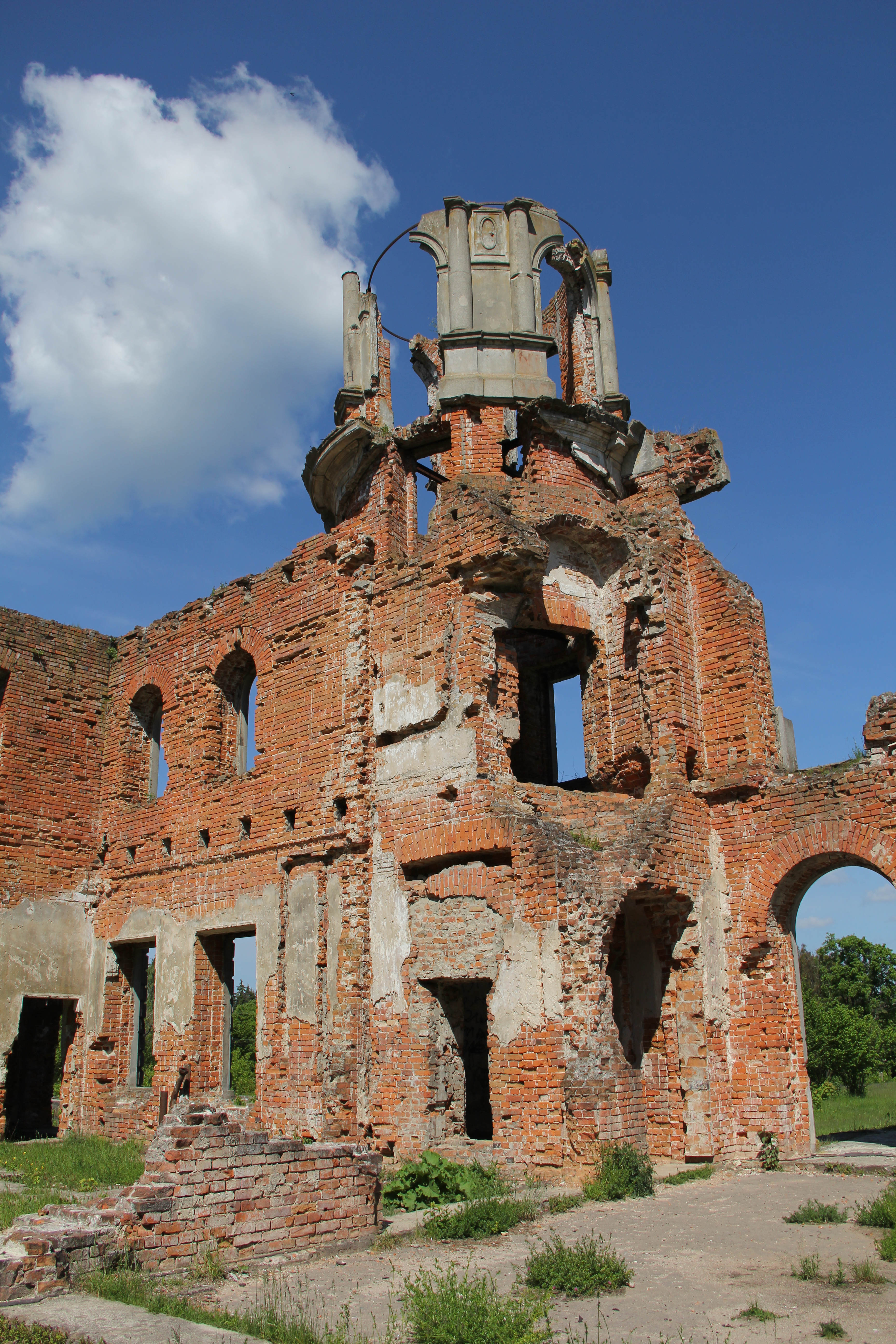 Руїни палацу Терещенків. Башня.